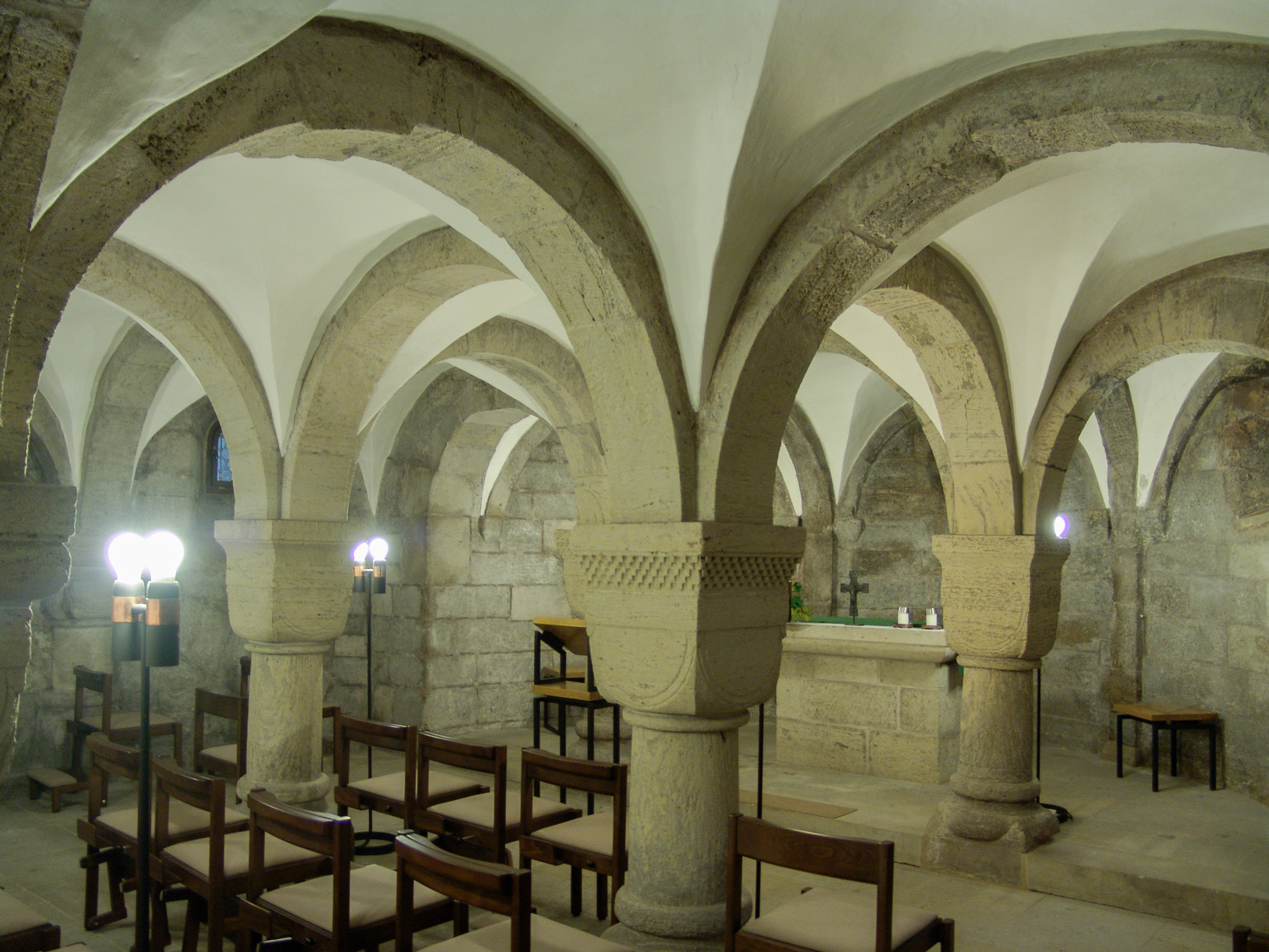 Nordhausen, Dom, Krypta